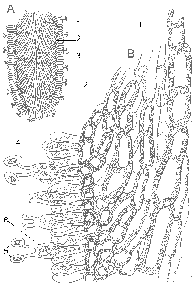 Agaricus bisporus